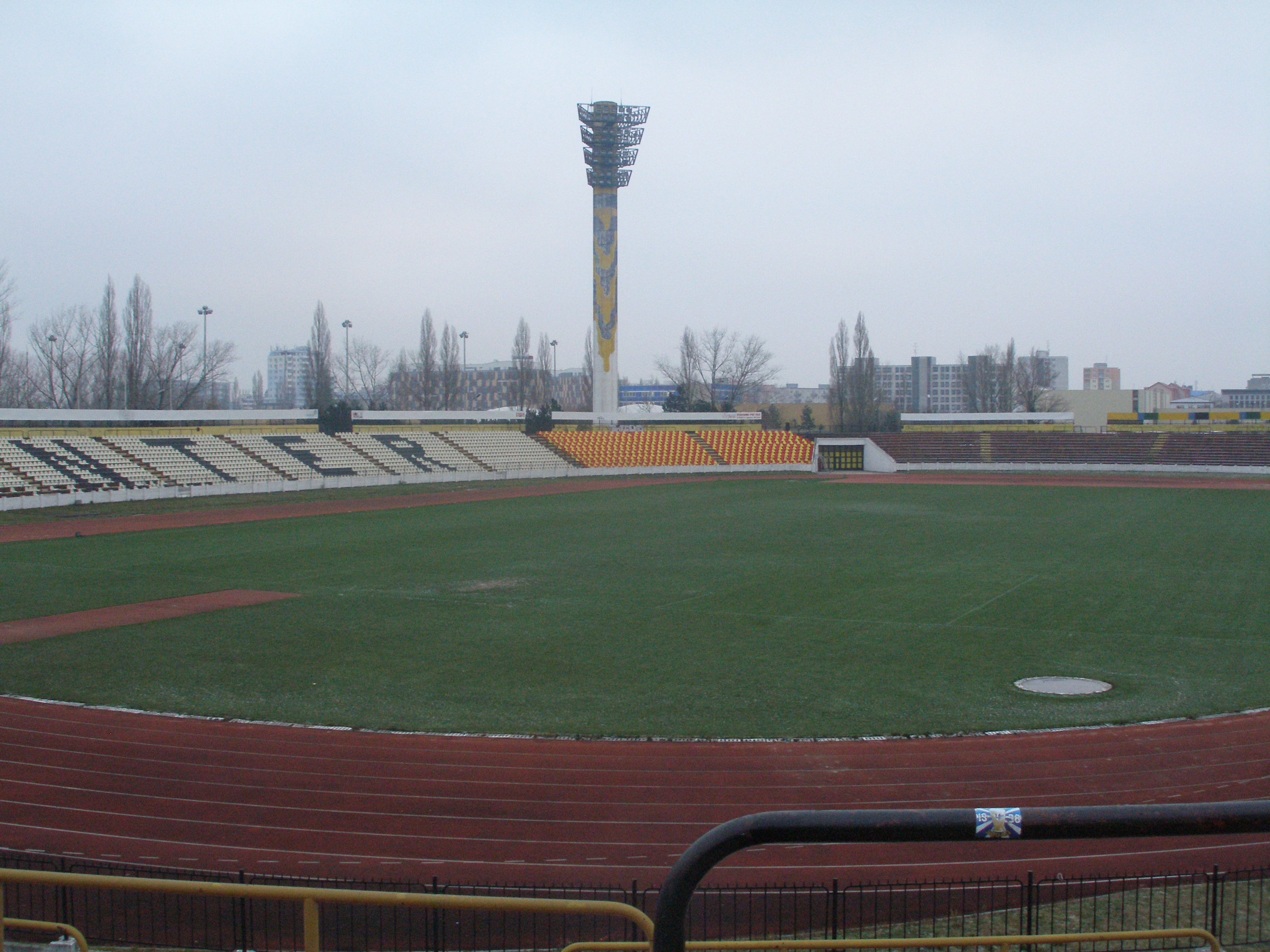 Štadión Pasienky, Bratislava